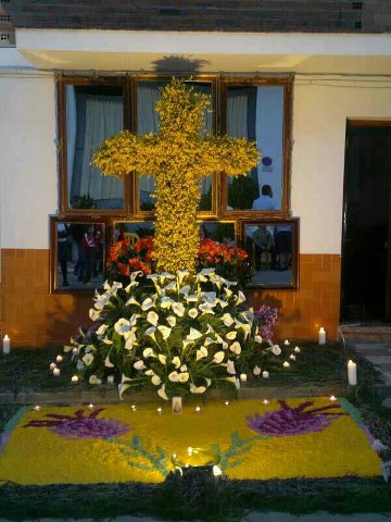 Cruces de Mayo de Herrera del Duque